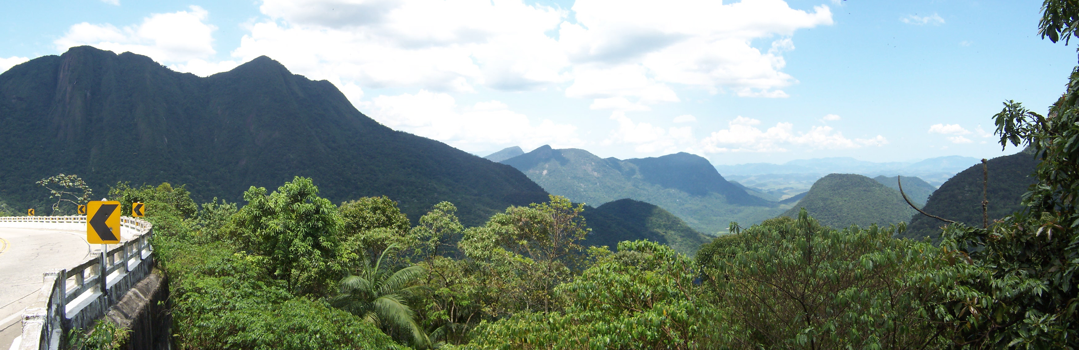 Guapimirim - Rj